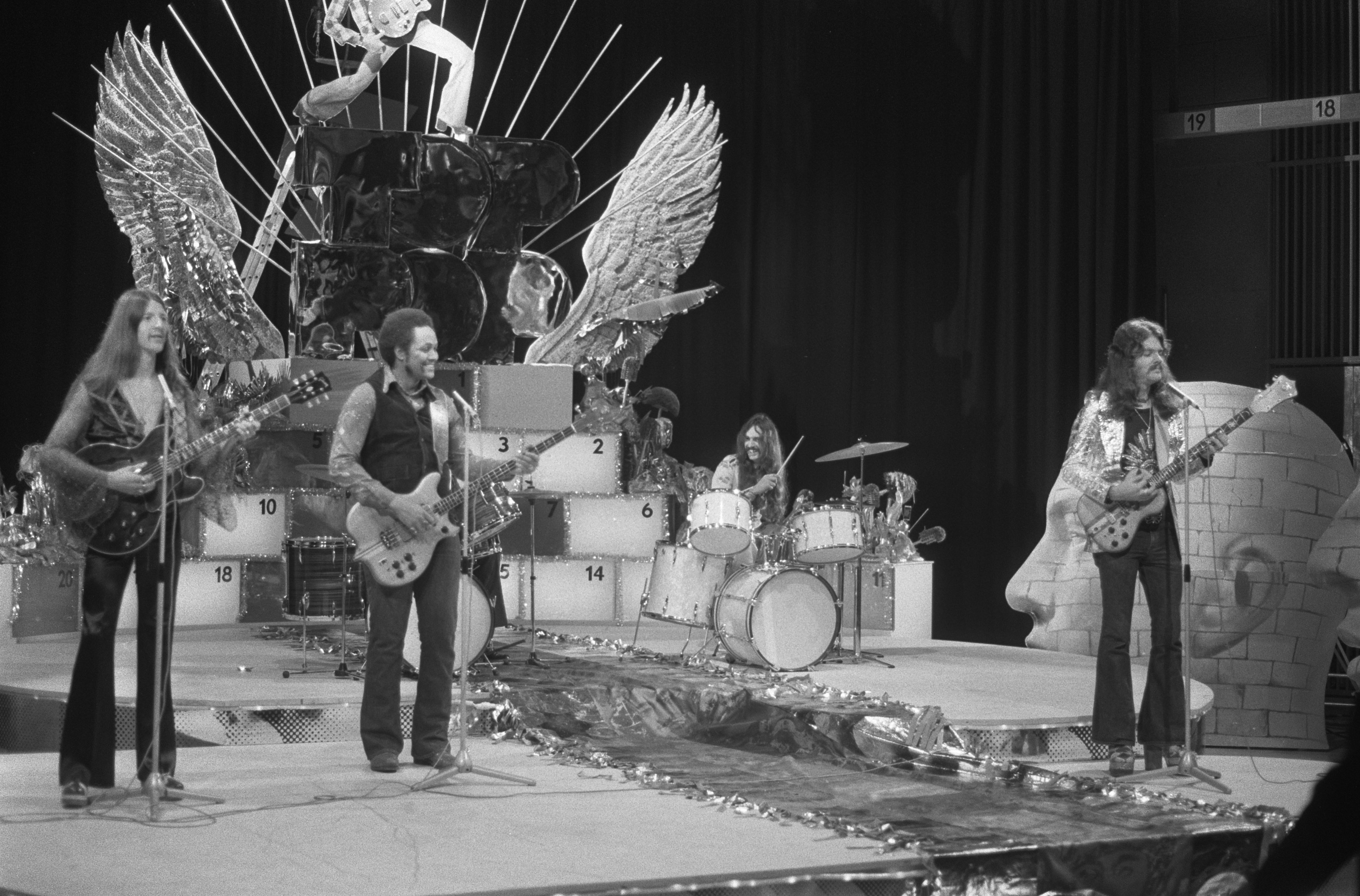 Collectie / Archief : Fotocollectie Anefo Reportage / Serie : [ onbekend ] Beschrijving : Dooby Brothers in het muziekprogramma Toppop Datum : 22 januari 1974 Locatie : Hilversum, Noord-Holland Trefwoorden : muziekprogramma's, popgroepen, televisieprogramma's Persoonsnaam : Dooby Brothers Instellingsnaam : Toppop Fotograaf : Peters, Hans / Anefo Auteursrechthebbende : Nationaal Archief Materiaalsoort : Negatief (zwart/wit) Nummer archiefinventaris : bekijk toegang 2.24.01.05 Bestanddeelnummer : 926-9583